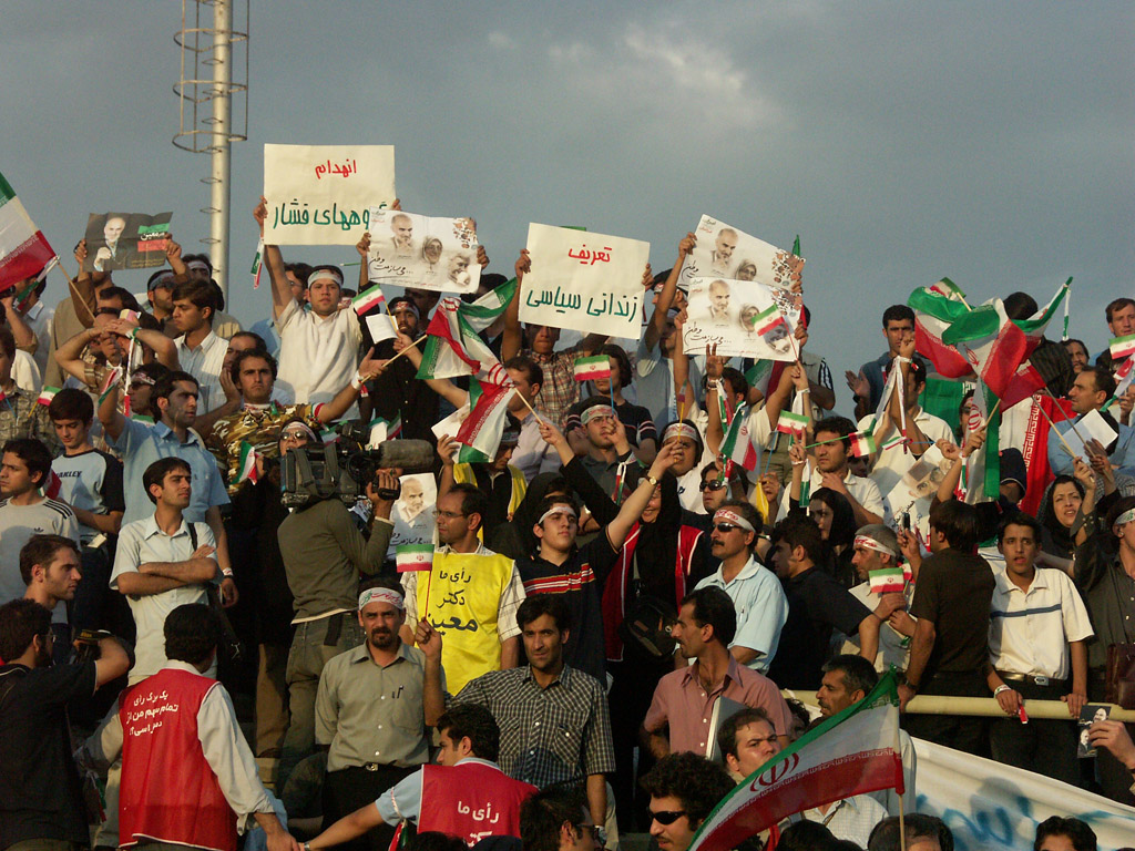 Moeen's main slogan is defending human rights.